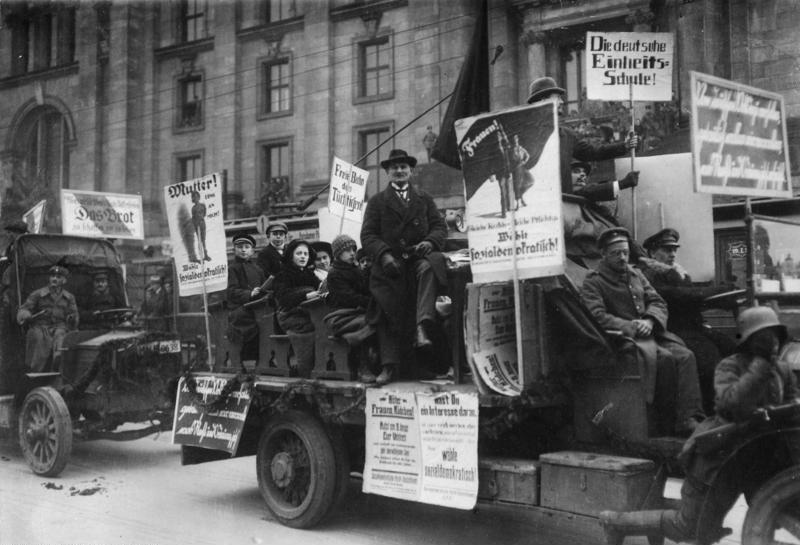 Wahlen zur Nationalversammlung am 19.1.1919 Wahlpropaganda-Korso der Sozialdemokraten in Berlin